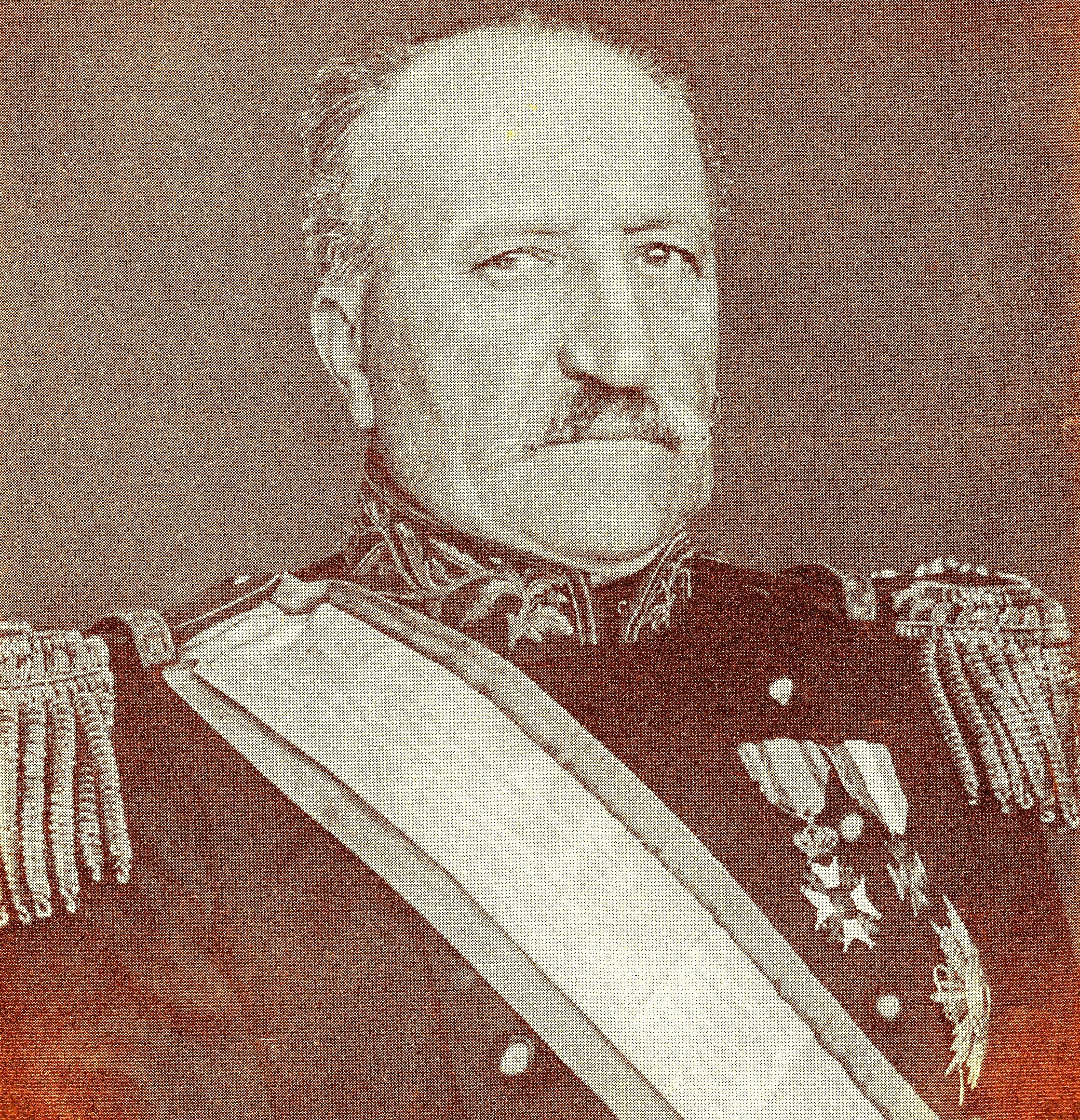 Generaal der genie en minister van oorlog Kornelis Eland